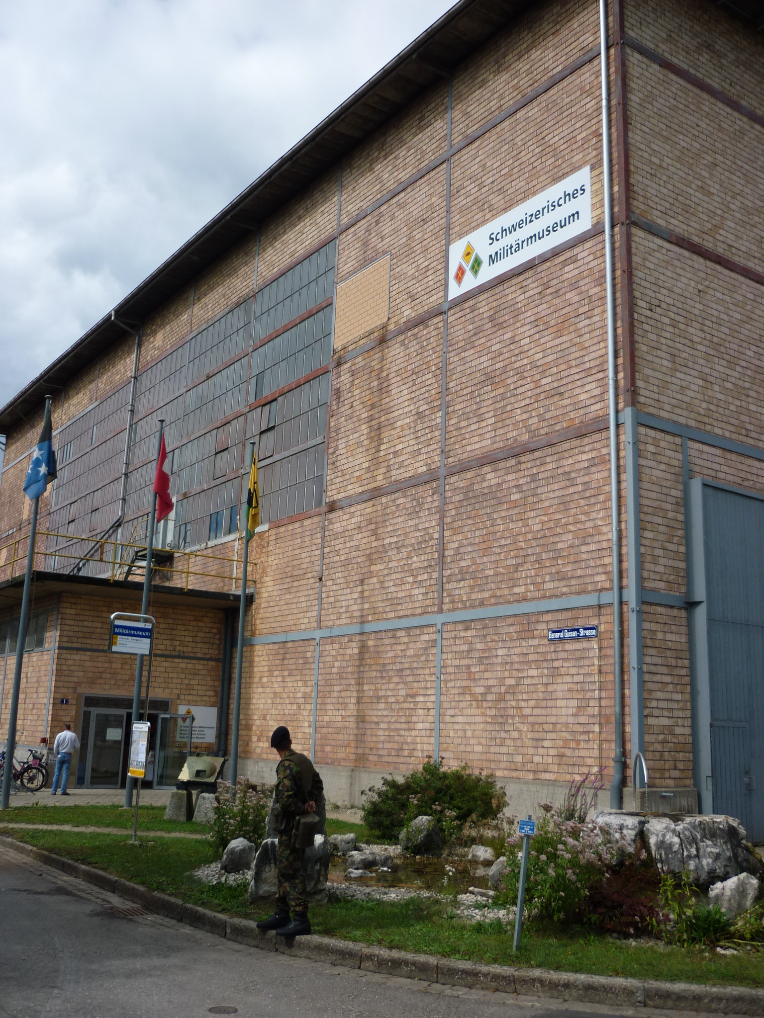 Schweizerisches Militärmuseum Full AG, Schweiz